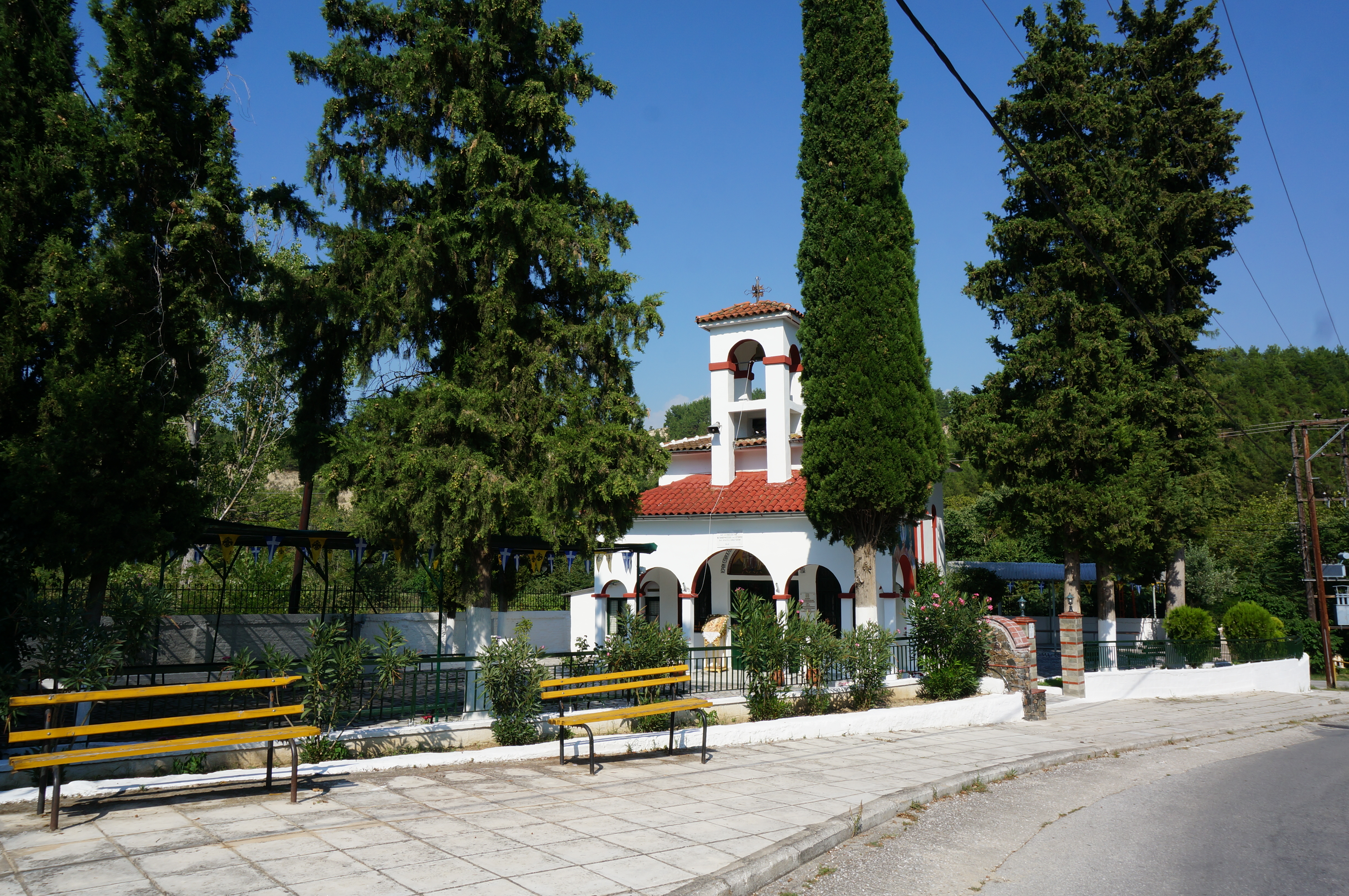 église dans la montée aux ruines byzantines à Serres.